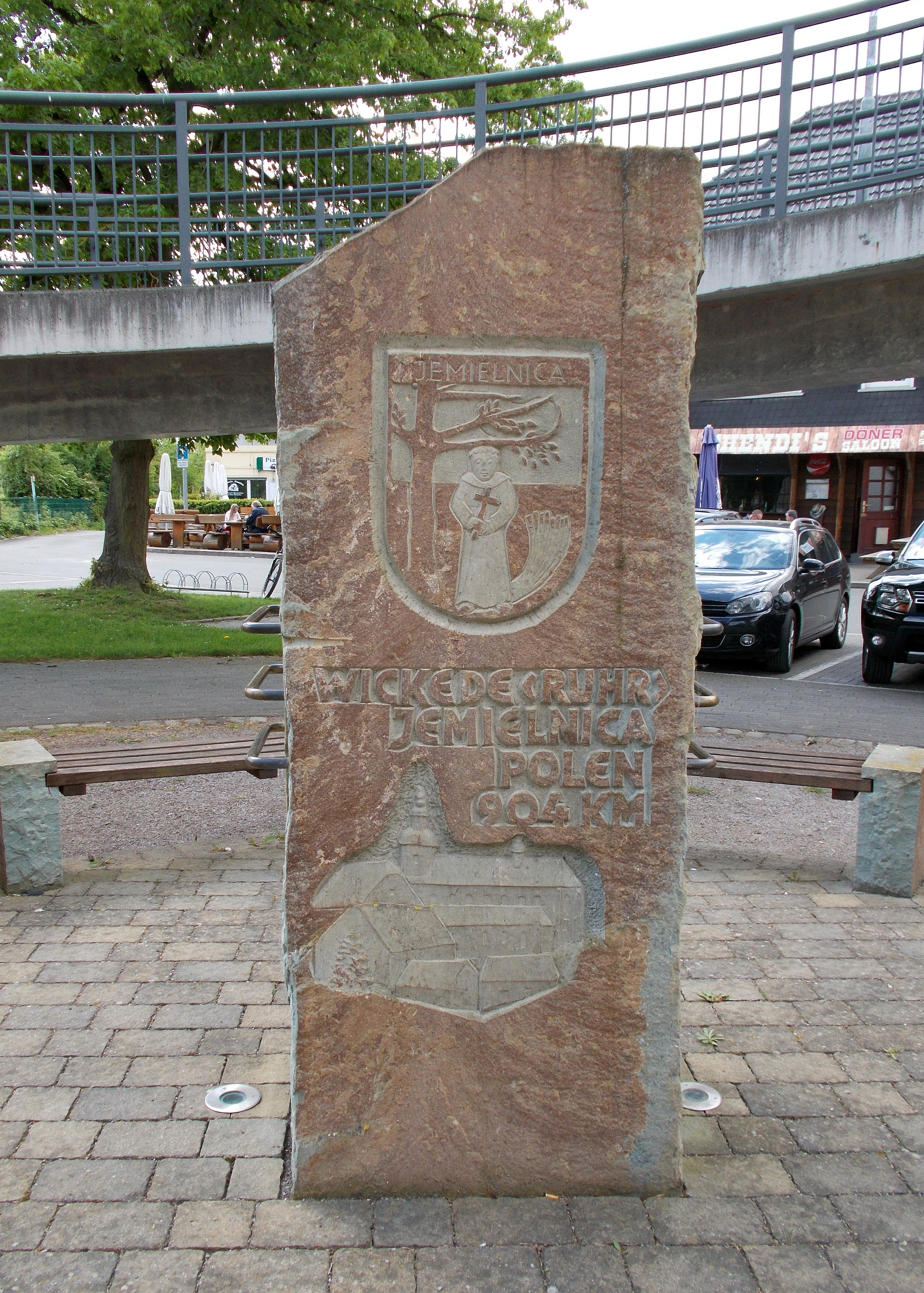 Hinweis- und Entfernungstein zur Partnerstadt Jemielnica in Wickede (Ruhr)